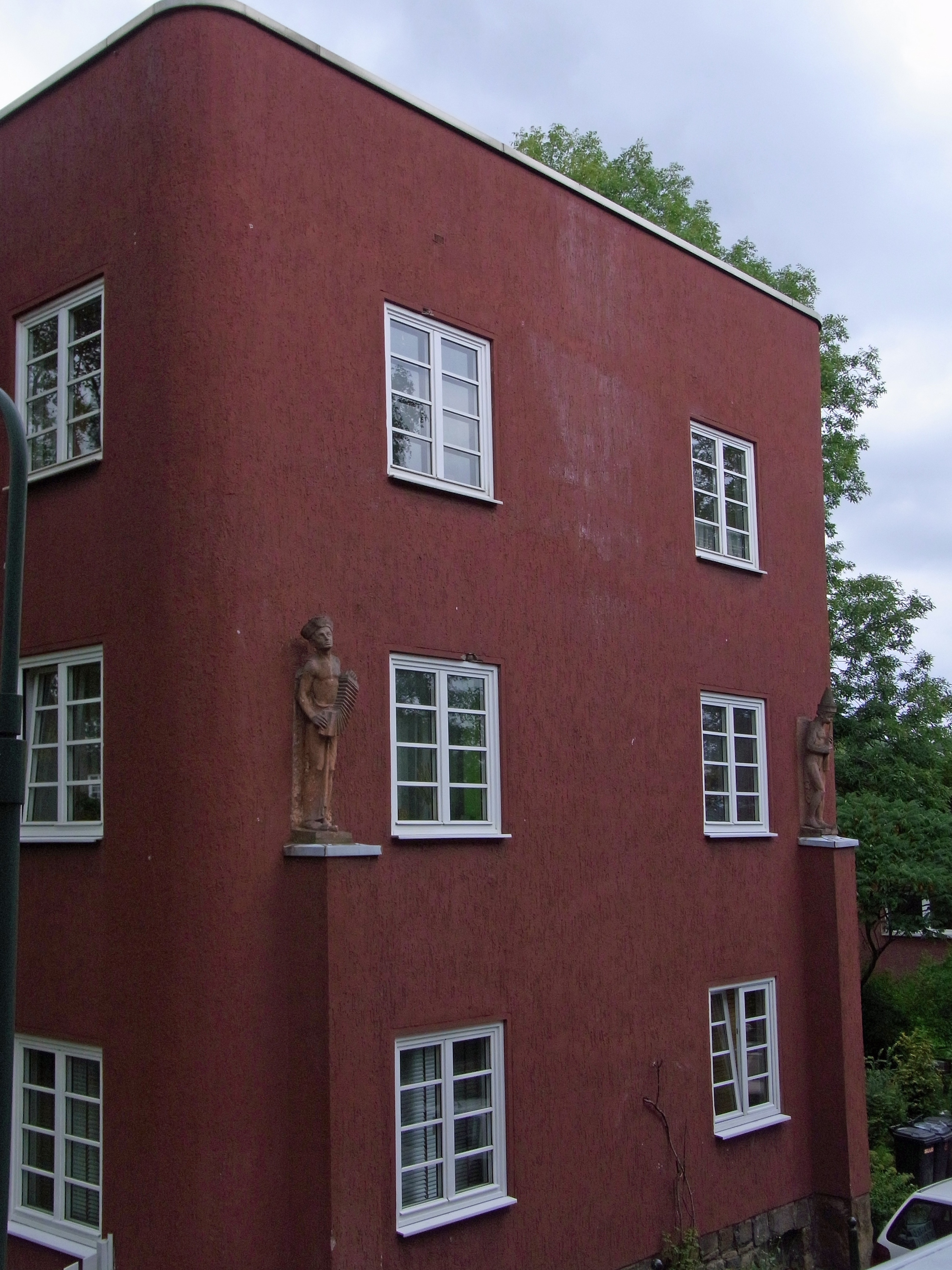 Tag des offenen Denkmals 2010: Hagen Cunosiedlung, Skulptur von Karel Niestrath